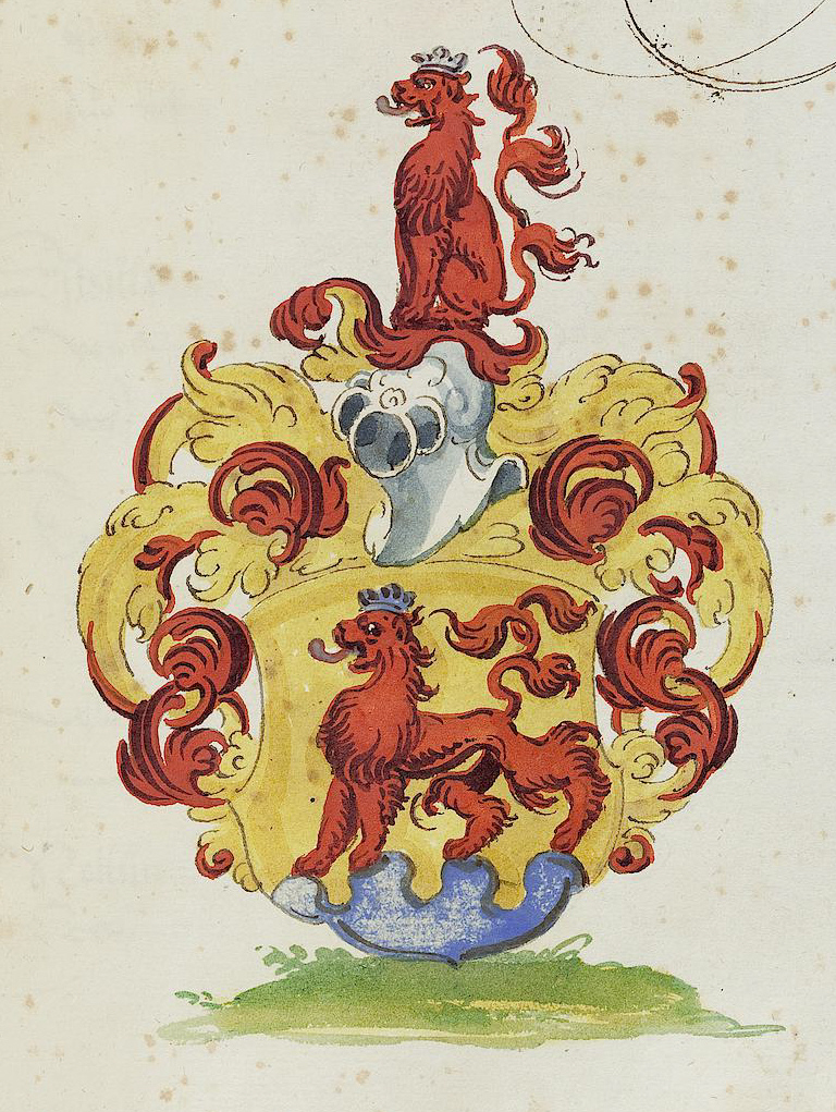 Wappen aus: David Wolleber: Chorographia Württemberg, [Schorndorf] 1591, Universitätsbibliothek Tübingen, Mh 6,1 Wappen der Grafen von Calw